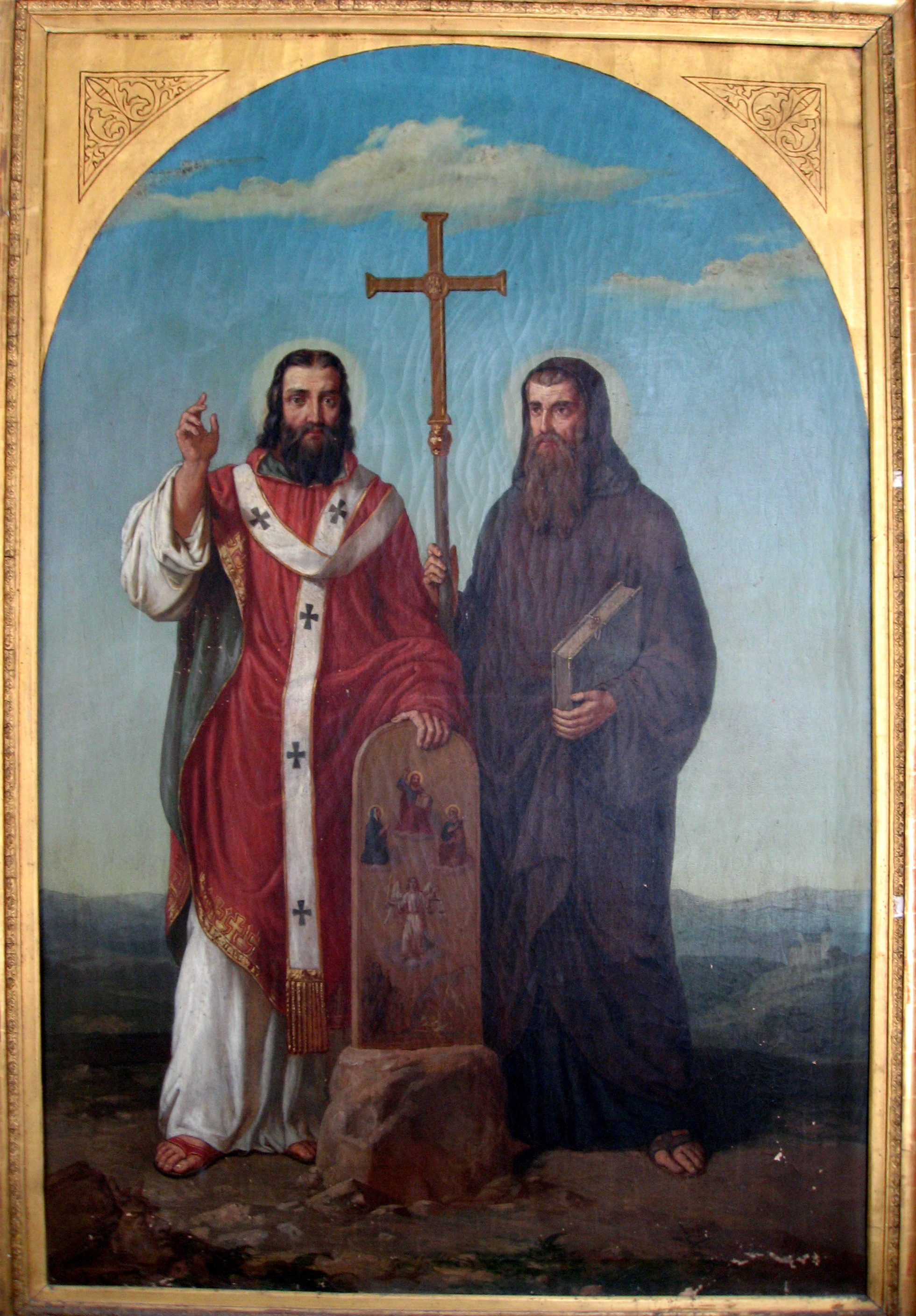 Svatý Cyril a Metoděj, obraz od Josefa Zeleného v Rajhradském klášteře